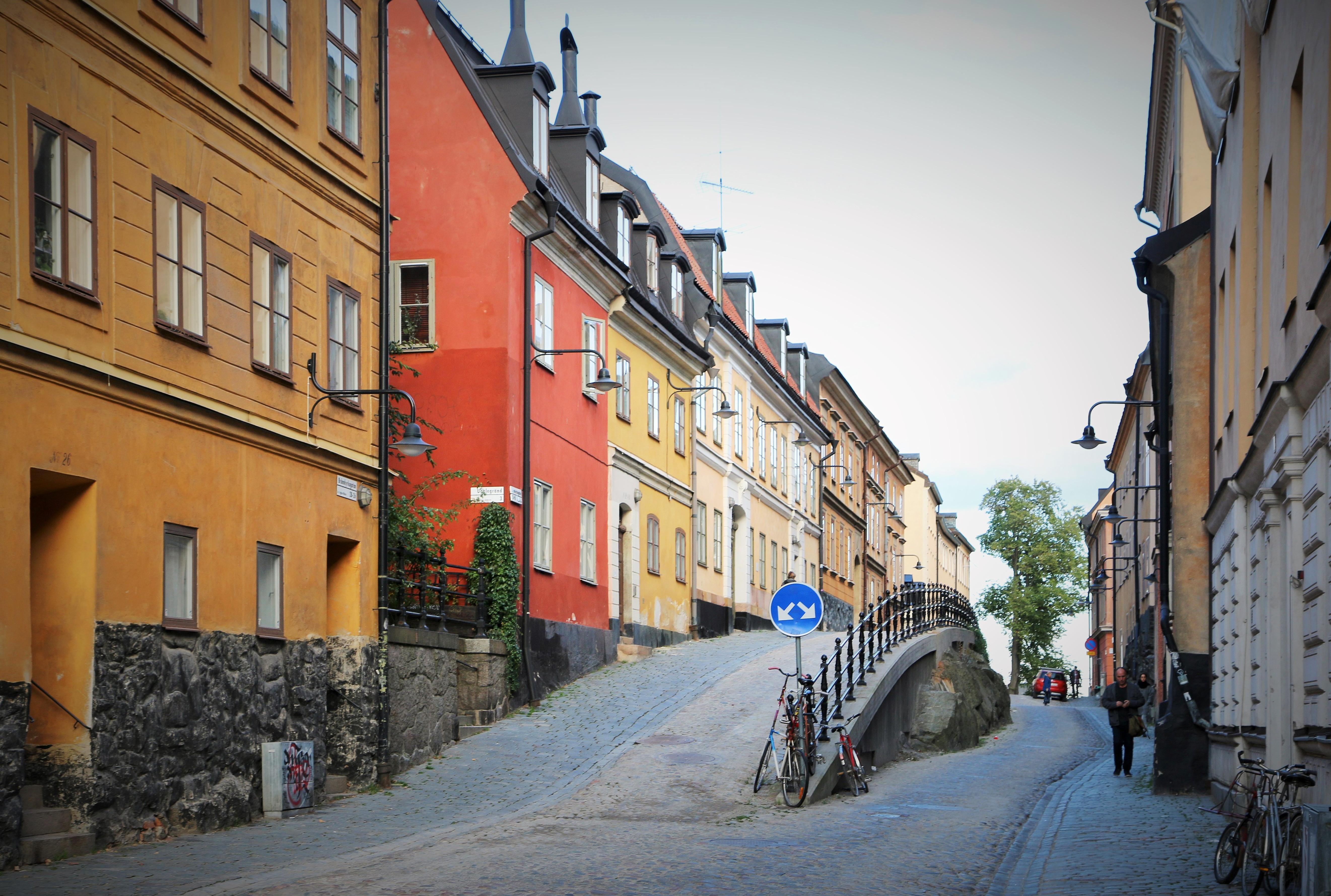 Brännkyrkagatan ved Södermalm i Stockholm. (Merk pukkelen)